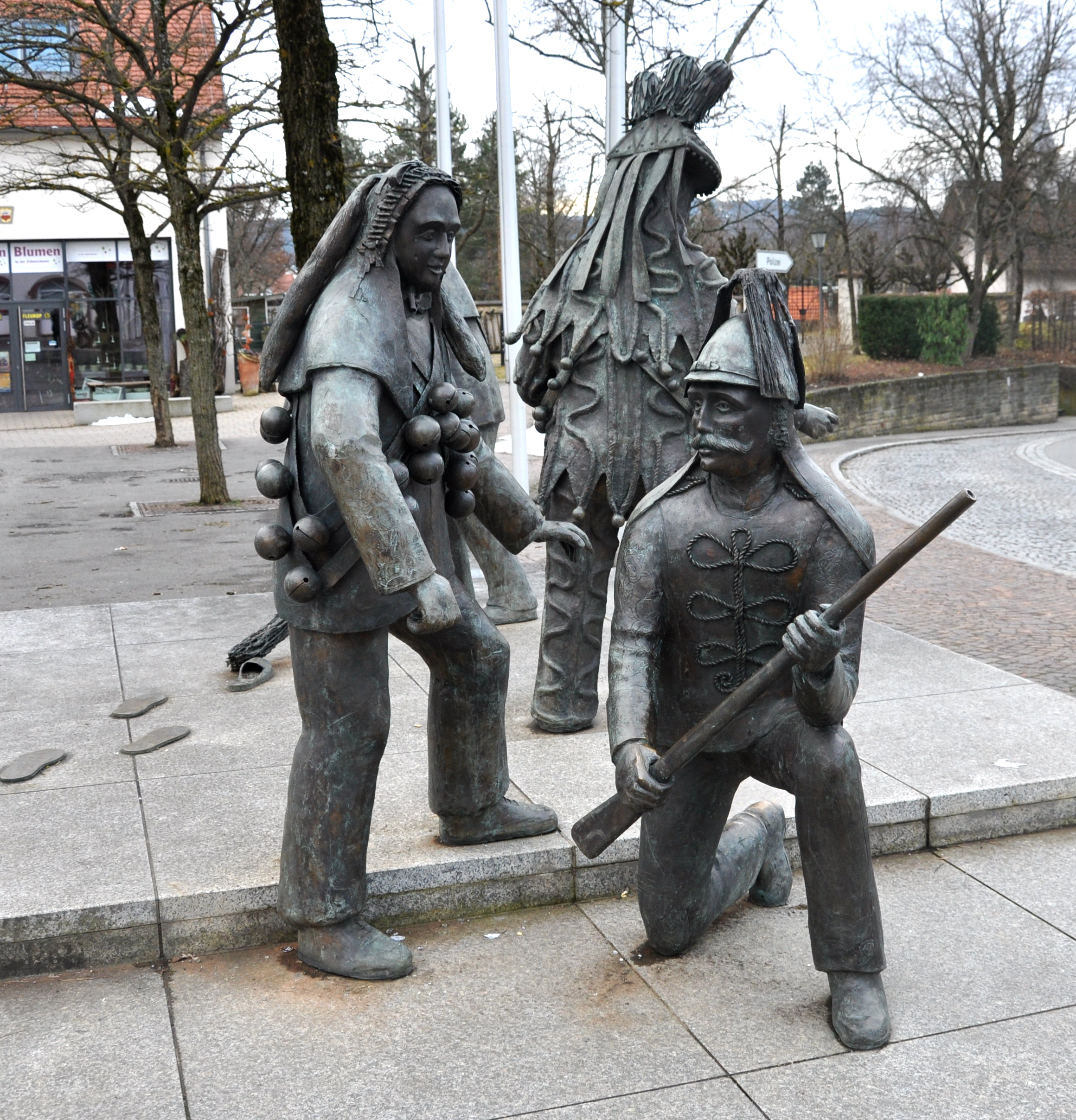 Schömberg (Zollernalbkreis), Narrengruppe der Narrenzunft Schömberg, Skulpturengruppe von Günther Dietrich, Inzigkofen, 1998; Detail: Fuchswadel und Husar